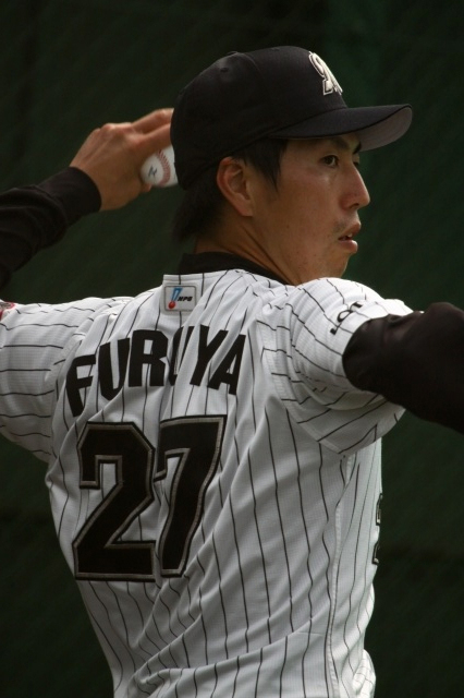 日本プロ野球 千葉ロッテマリーンズ 古谷拓哉 投手